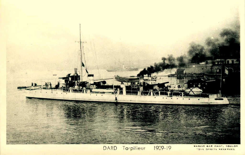 Contre-torpilleur français : Dard (Classe Arquebuse)